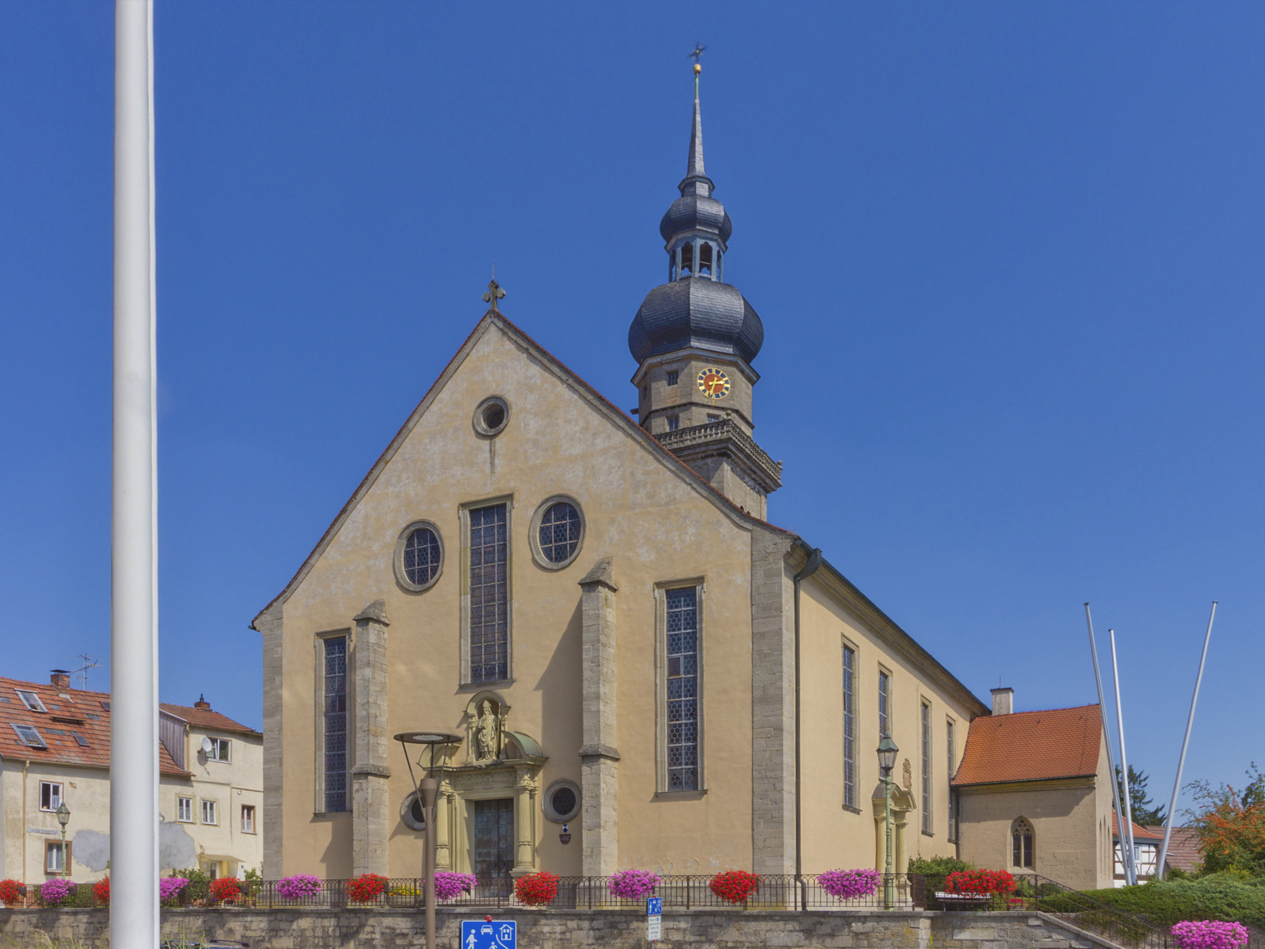 Stadtpfarrkirche St. Kilian in Mellrichstadt, Deutschland